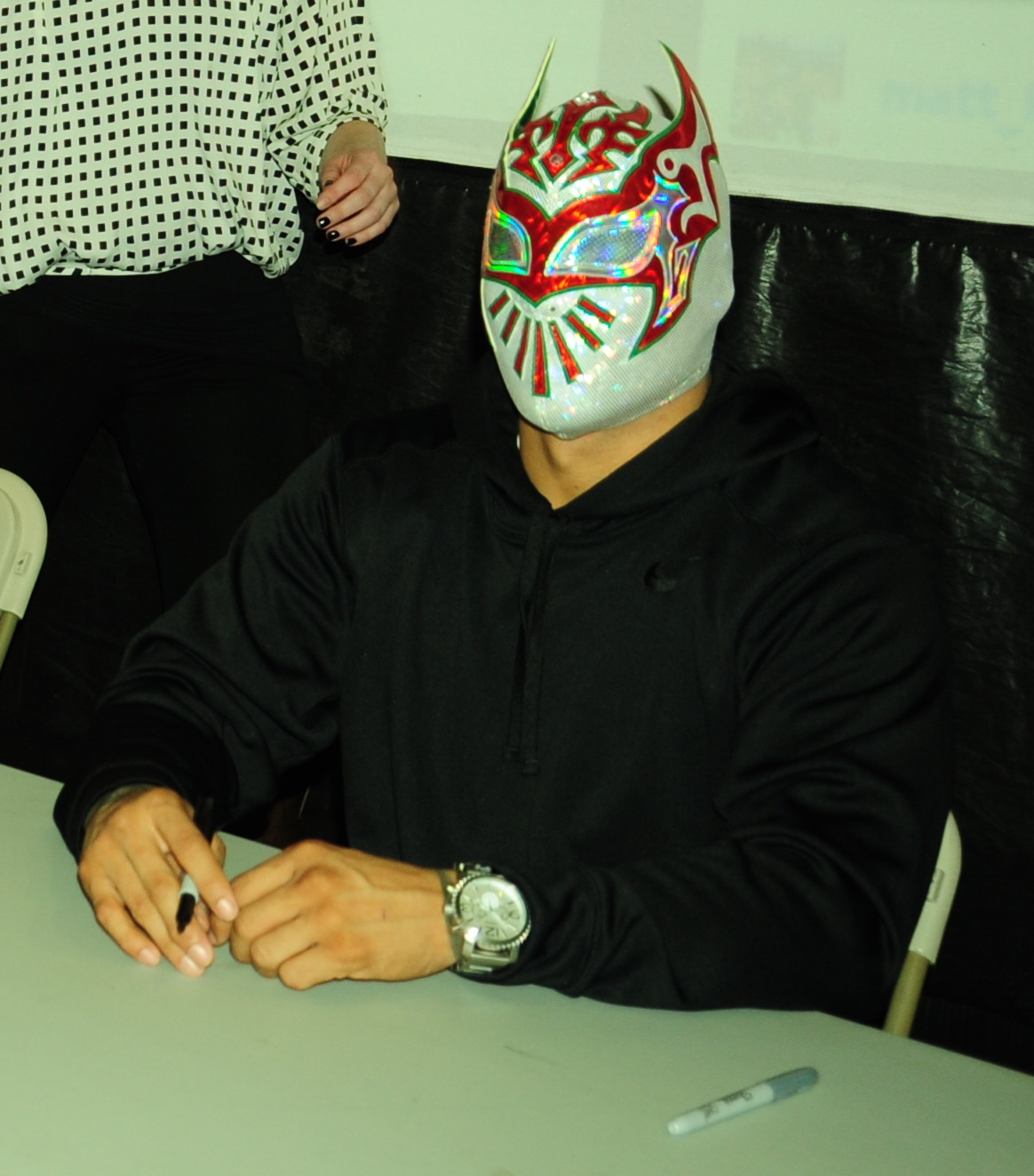 sin cara